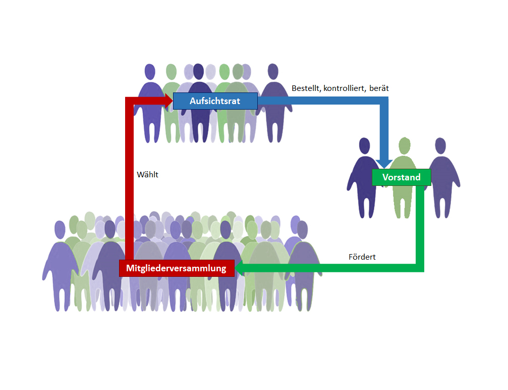 Diagram om Organaufbau einer kleineren Genossenschaft: Mitgliederversammlung Aufsichtsrat Vorstand